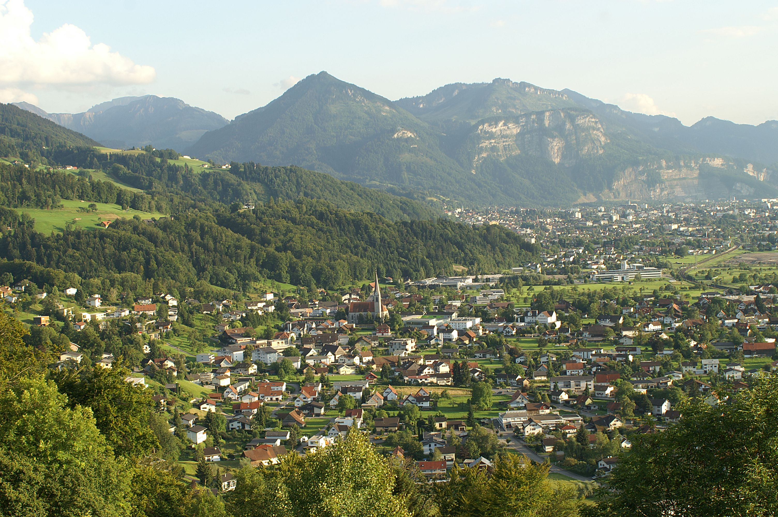 Gemeinde Schwarzach, im Hintergrund Dornbirn mit dem Staufenberg.